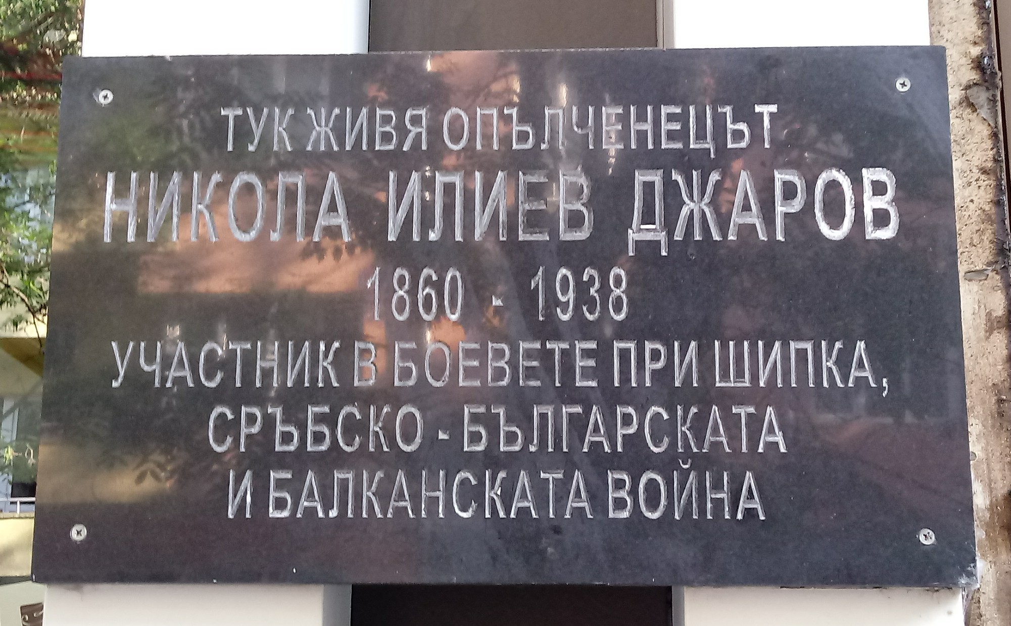 Nikola Dzharov memorial plaque, 89 Oborishte Str., Sofia